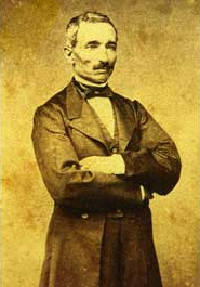 Balta y Montero fue presidente del perú